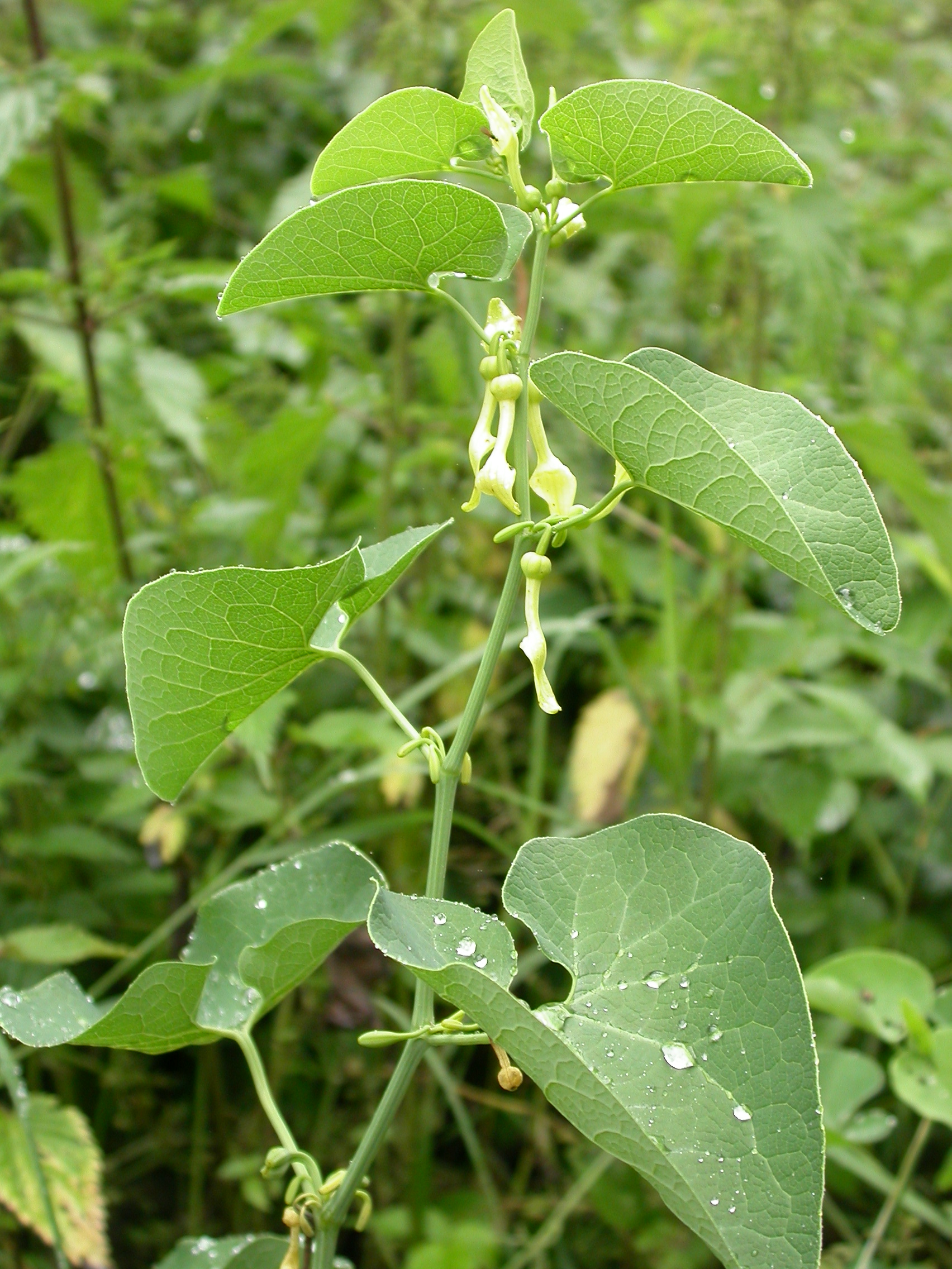 Aristolochia clematitis Creutzwald (Moselle), France